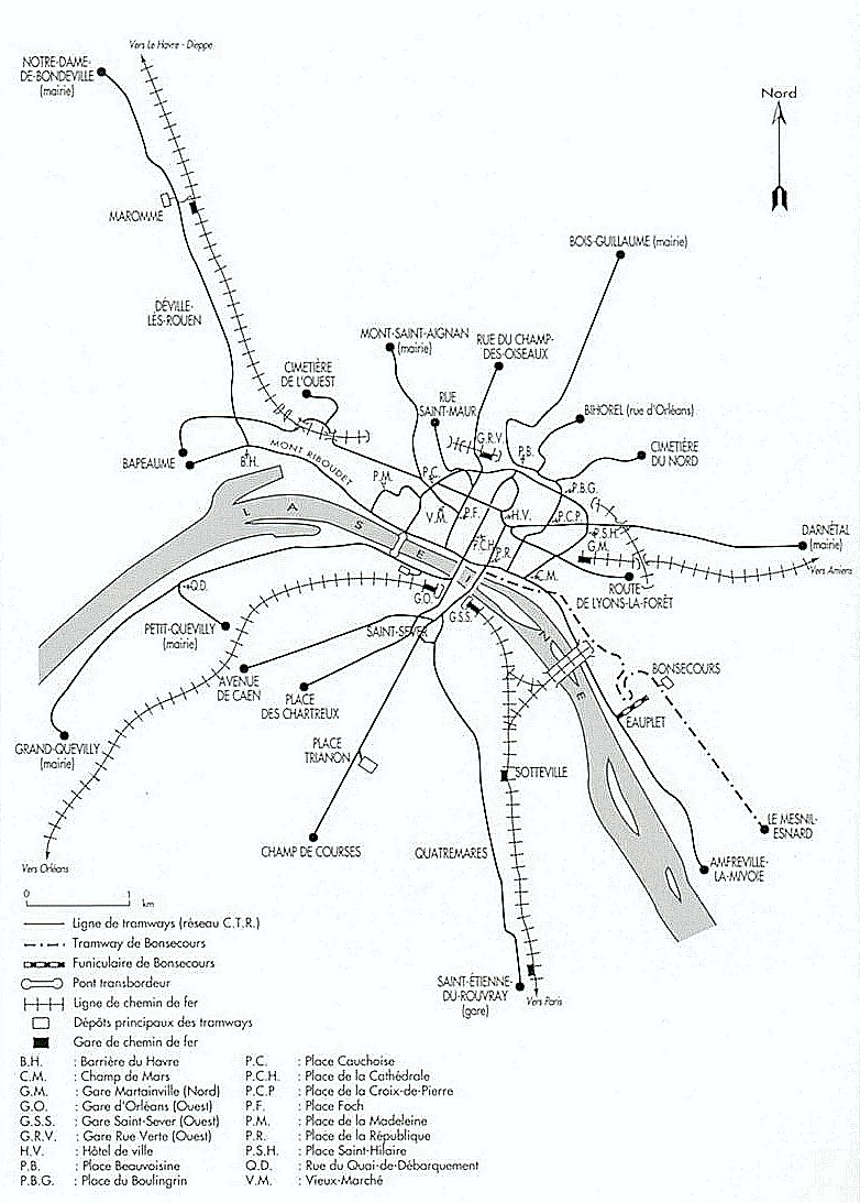 Plan du tramway de Rouen